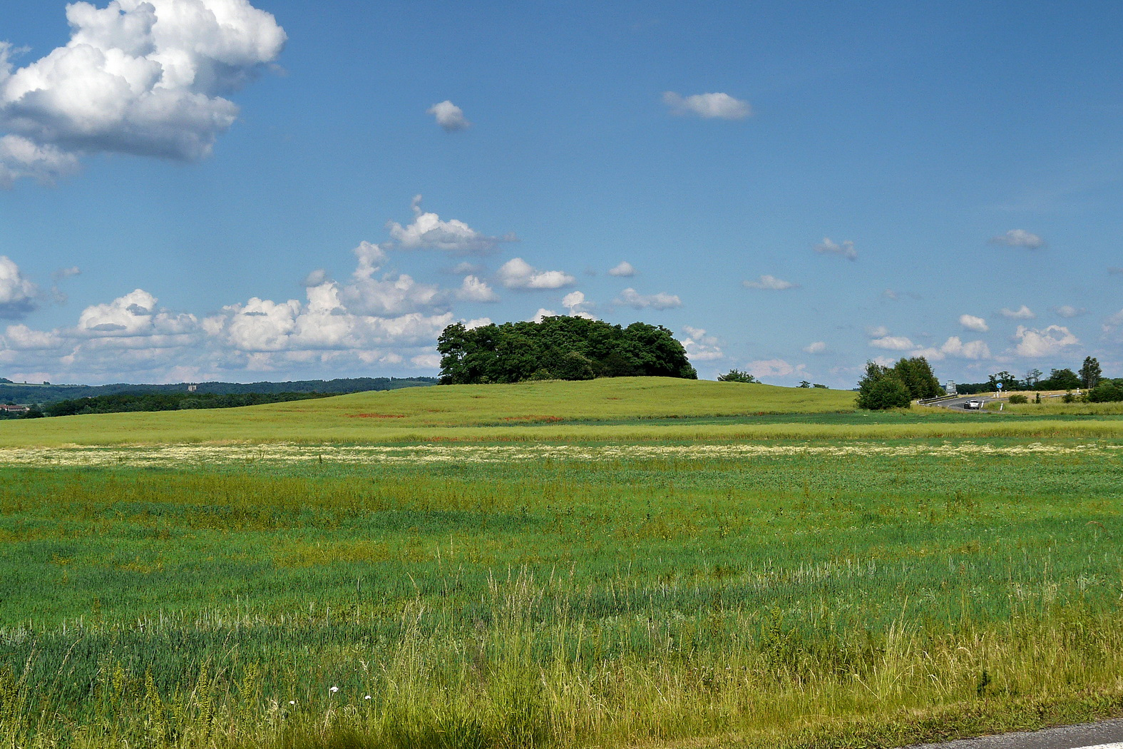 Vrch Kalvárka od jihozápadu